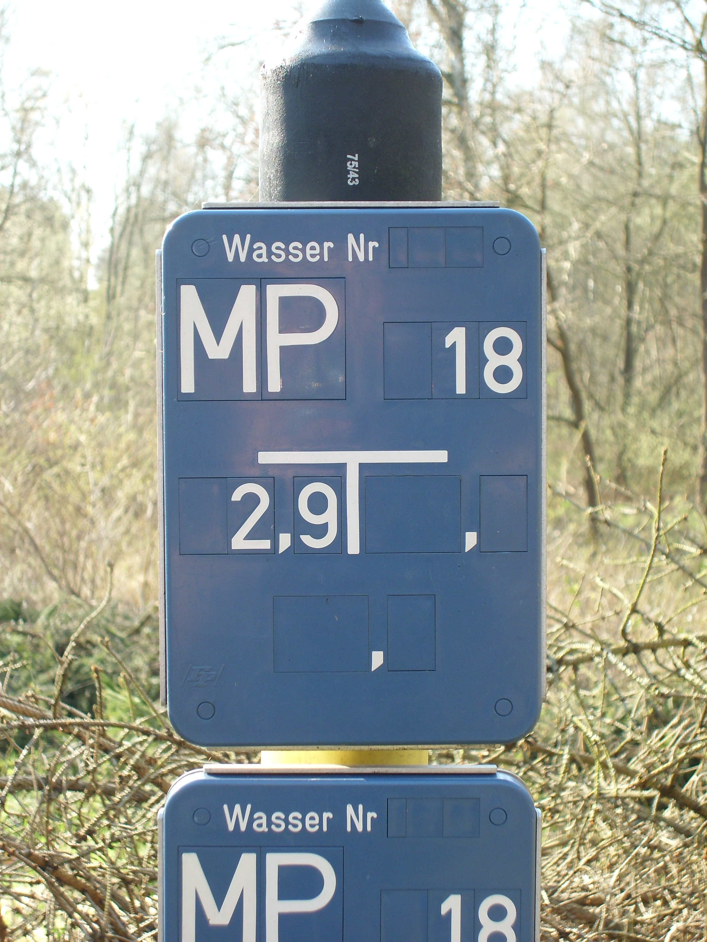 Hinweisschild Wassermesspunkt